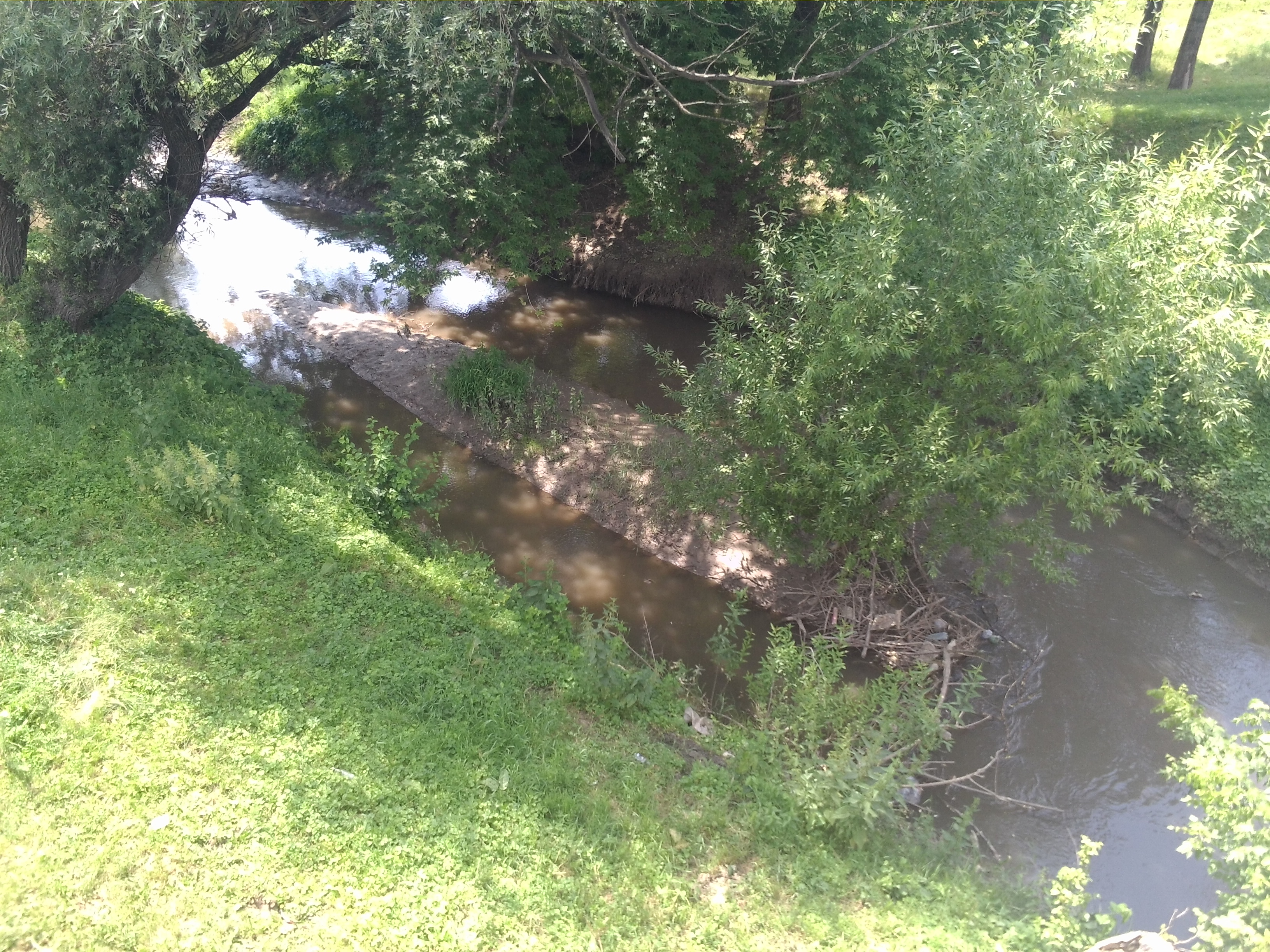 Річка Кам'янка у місті Кам'янка